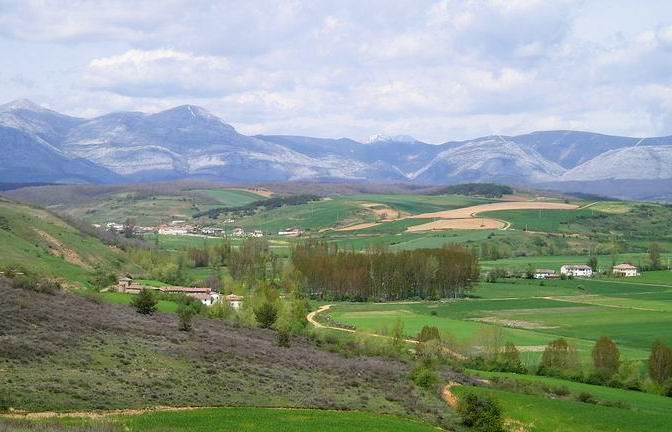 En primer término Vega de Riacos, más atrás Respenda de la Peña, al fondo la Sierra del Brezo.